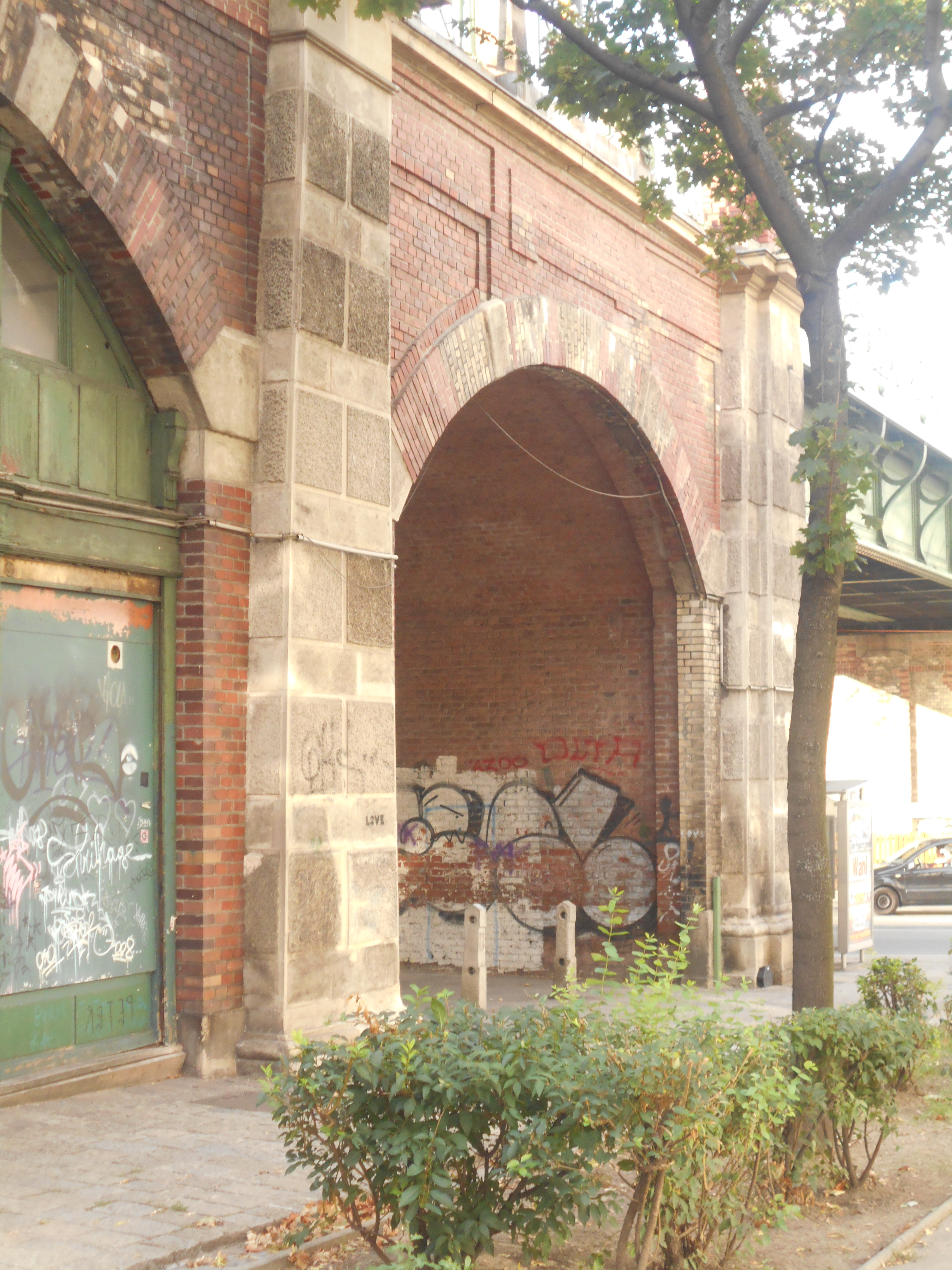 ehem. Stadtbahn - Teilbereich der heutigen U6, Gewölbe 77